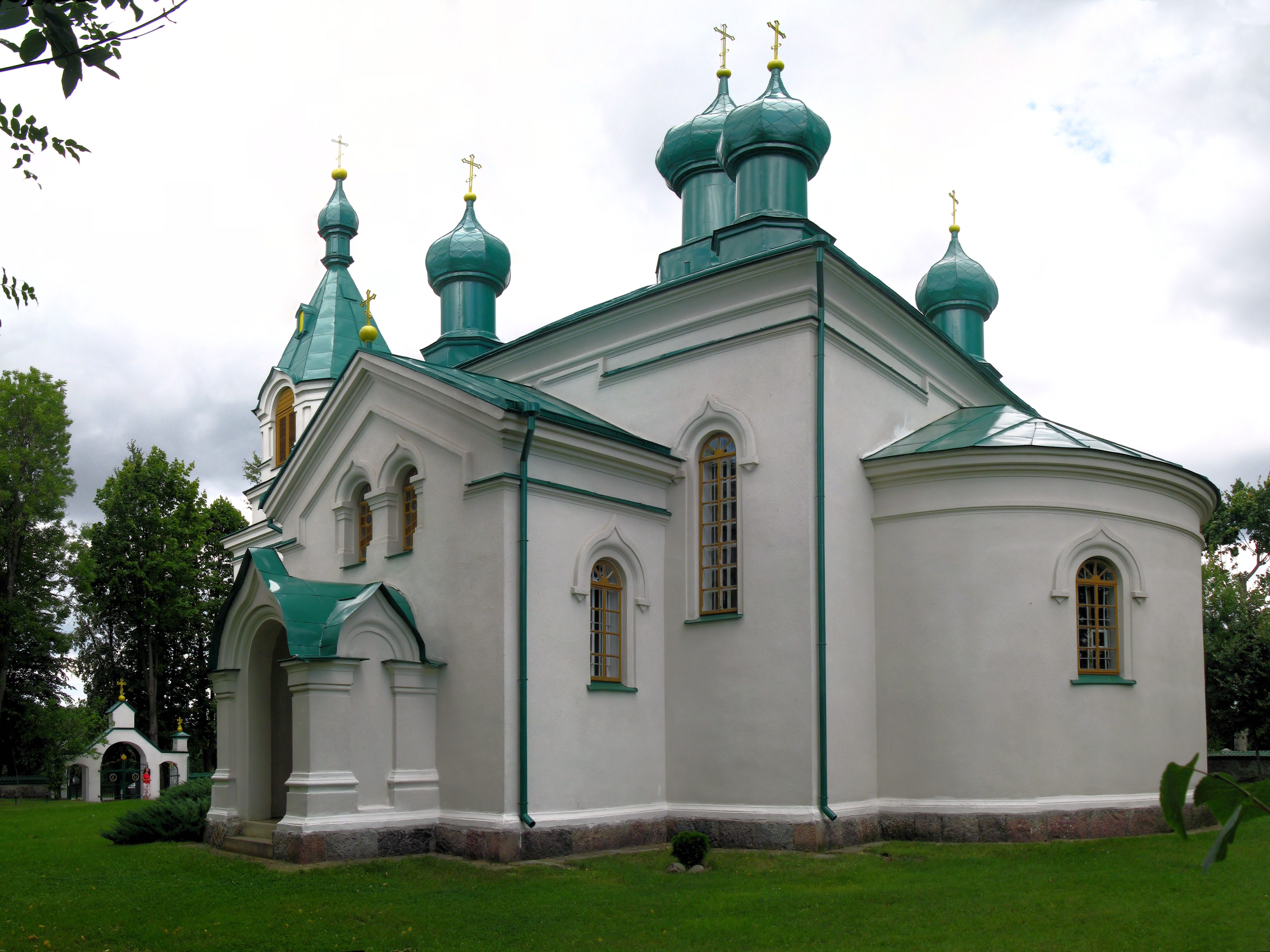 zespół cerkwi prawosławnej par. p.w. śś. Kosmy i Damiana: cerkiew prawosławna par. p.w. śś. Kosmy i Damiana ogrodzenie z bramą Ryboły, Zabłudów 12.1987.